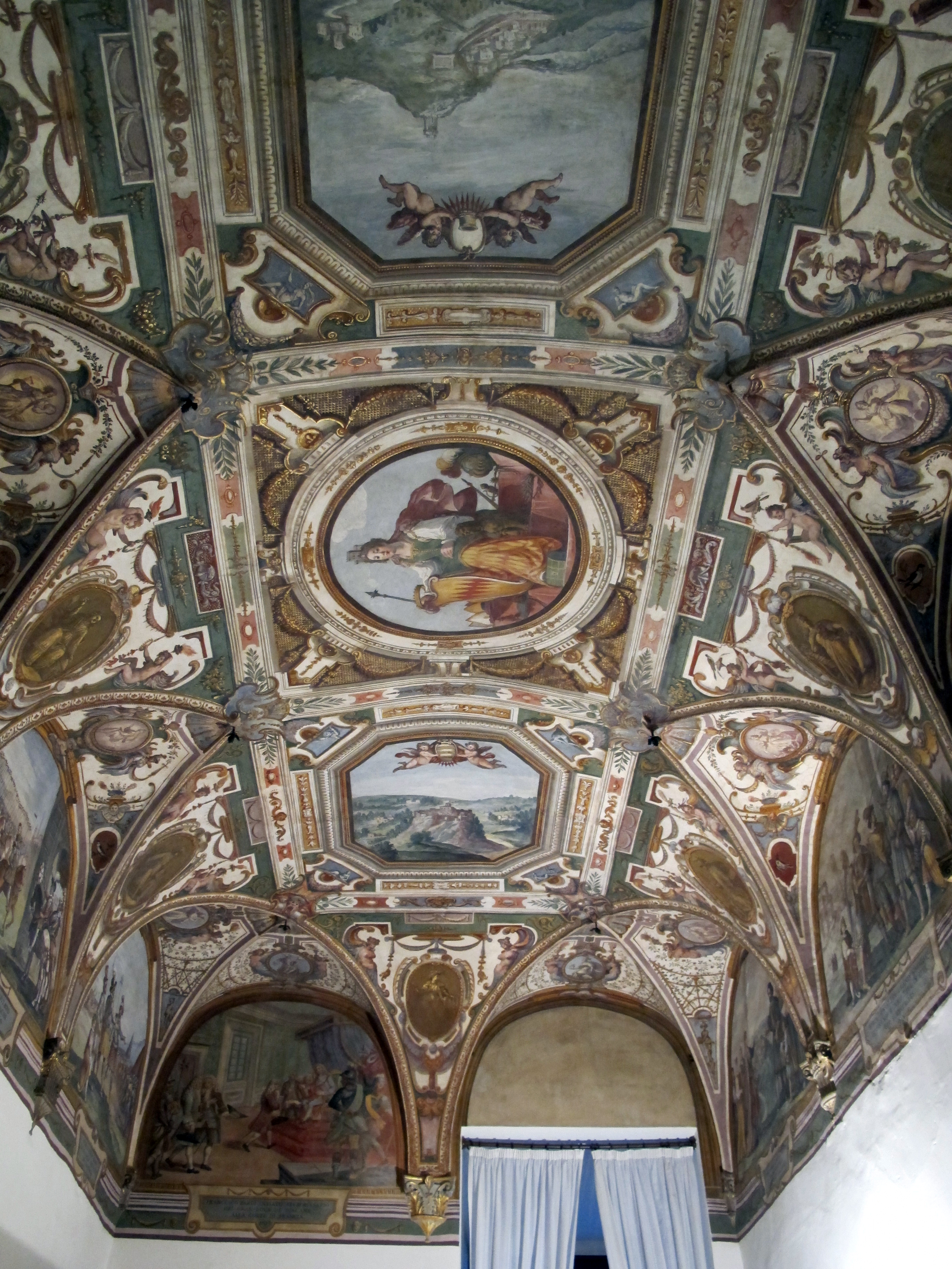 Cinganelli, esaltazione della famiglia Bardi